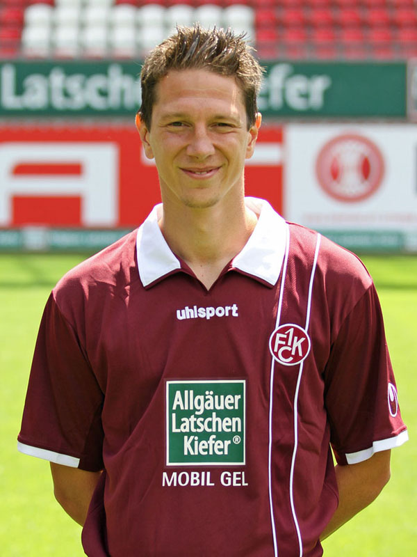 Jiri Bilek, Fußballspieler